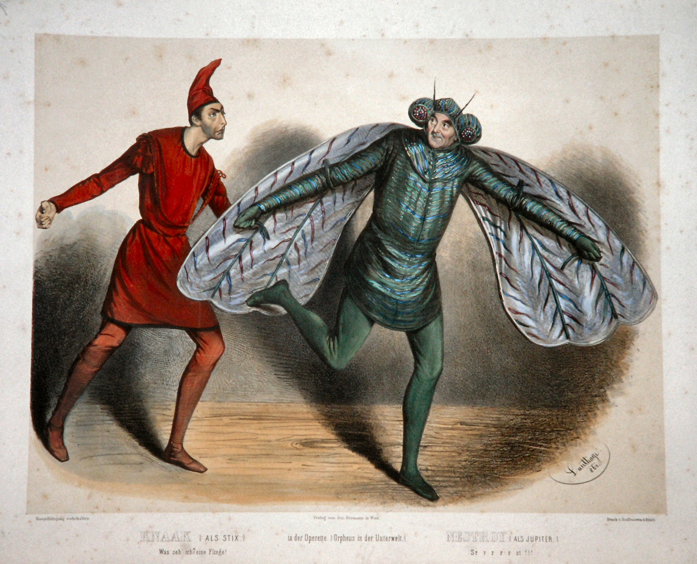 Wilhelm Knaack und Johann Nestroy in Orpheus in der Unterwelt, Lithographie von Adolf Dauthage aus dem Jahre 1860